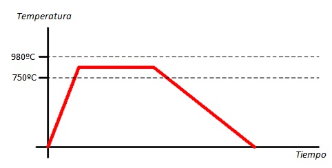 Grafica temperatura-tiempo del recocido